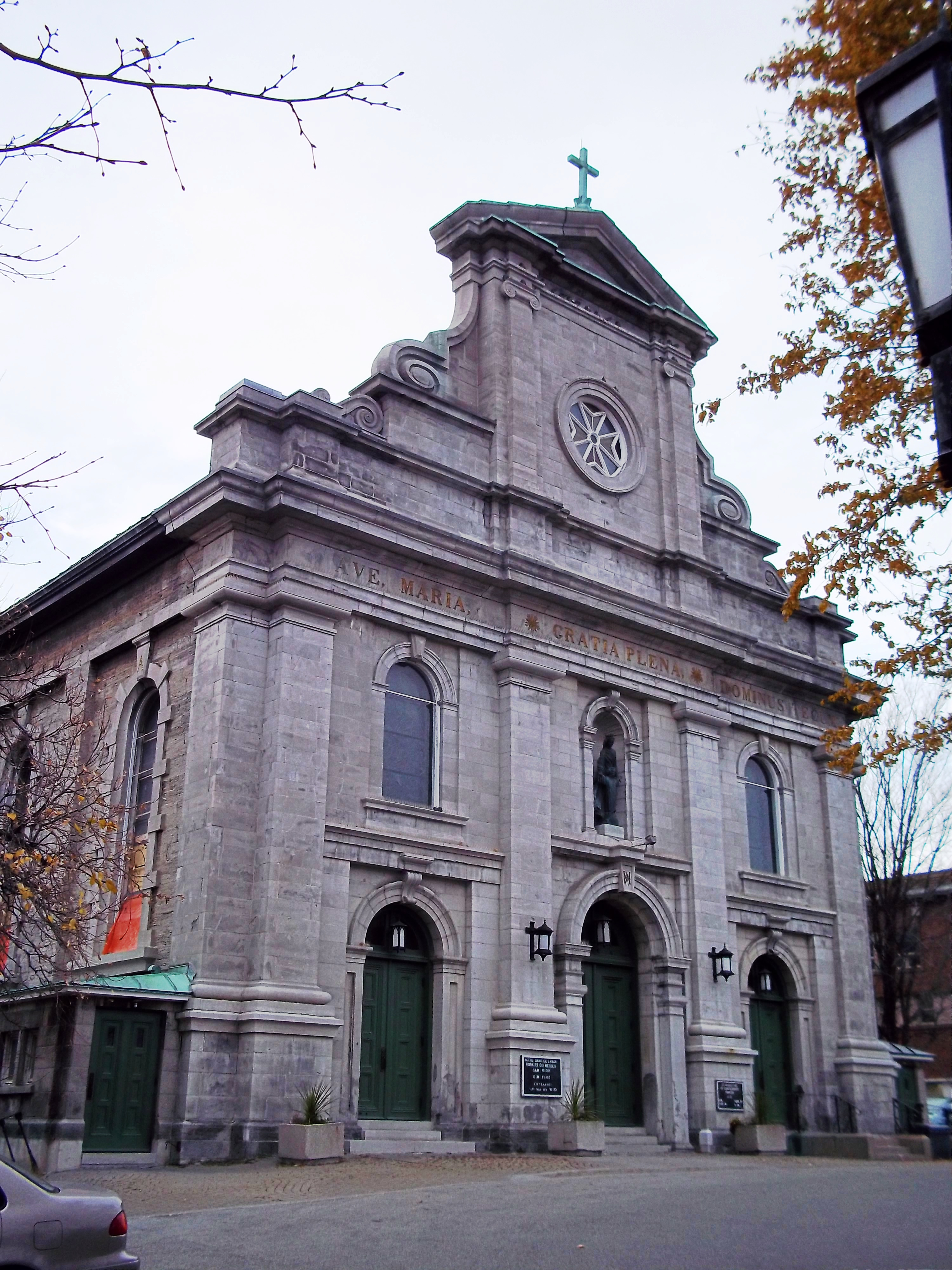 Église Notre-Dame-de-Grâce, 5333, avenue Notre-Dame-de-Grâce, Montréal